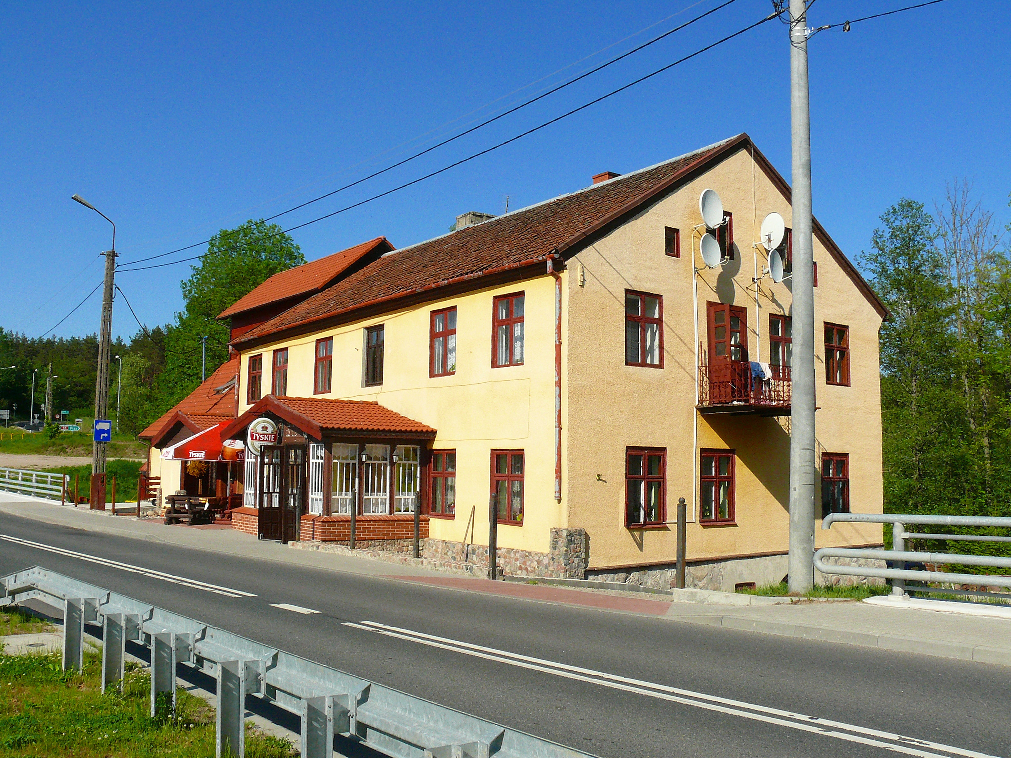 Mazury - zajazd -młyn Babięta